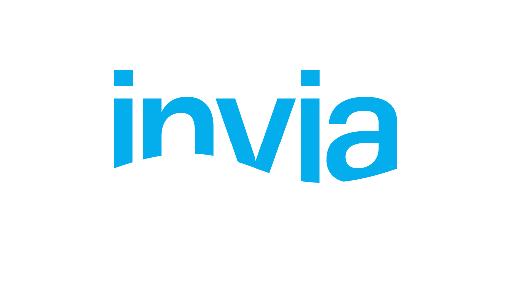 Logo Invia